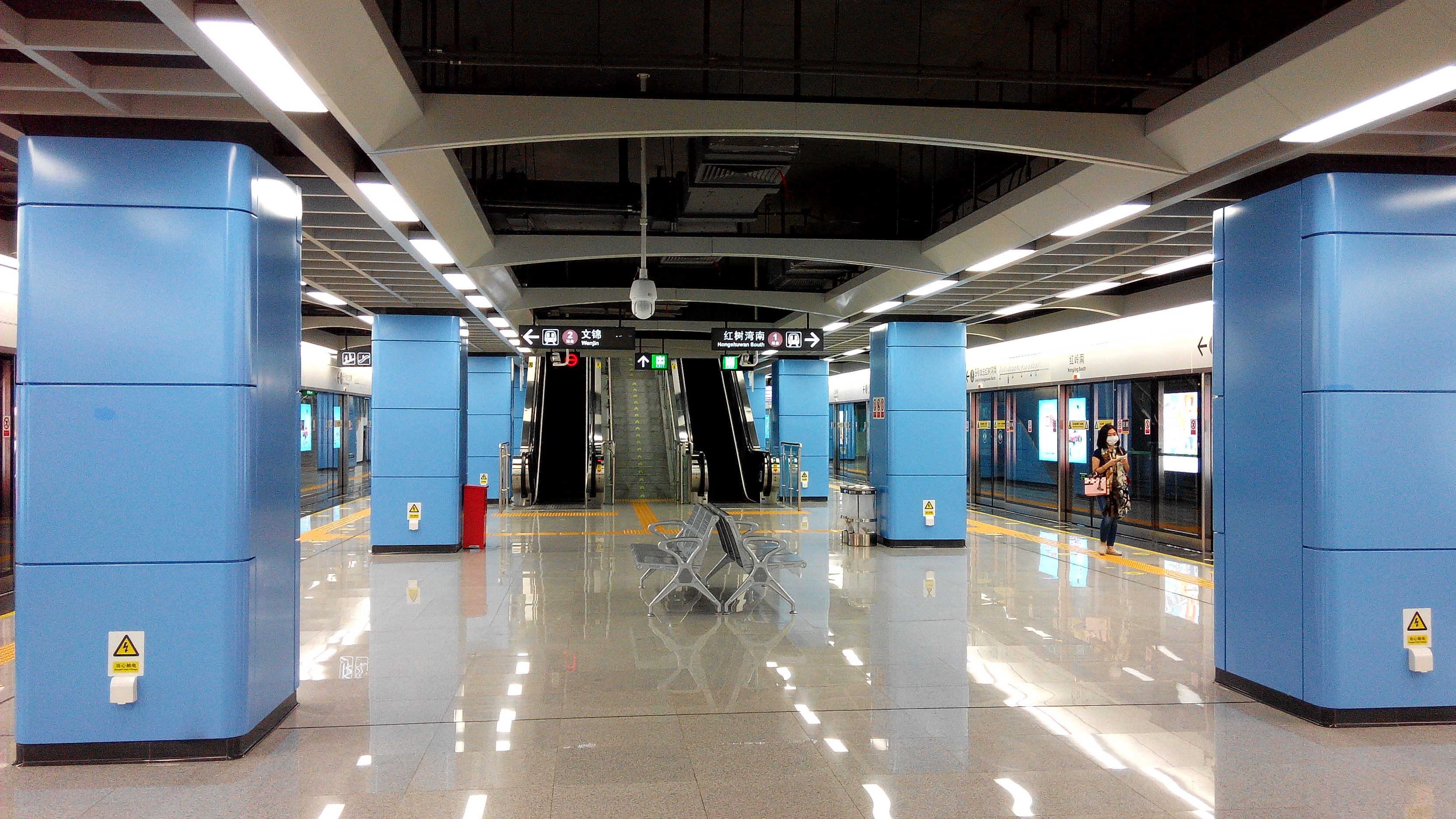 深圳地铁9号线 红岭南站站台